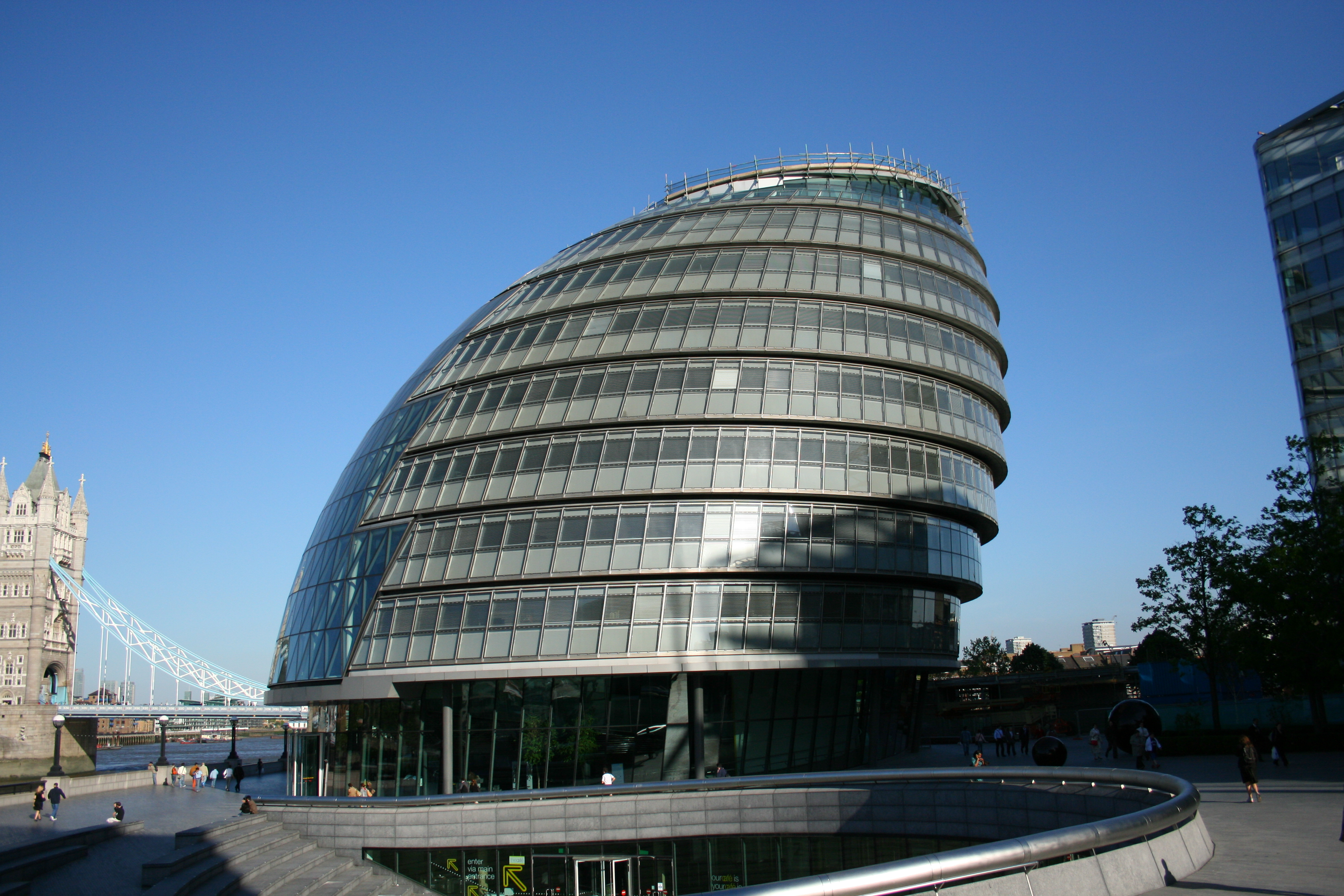 London